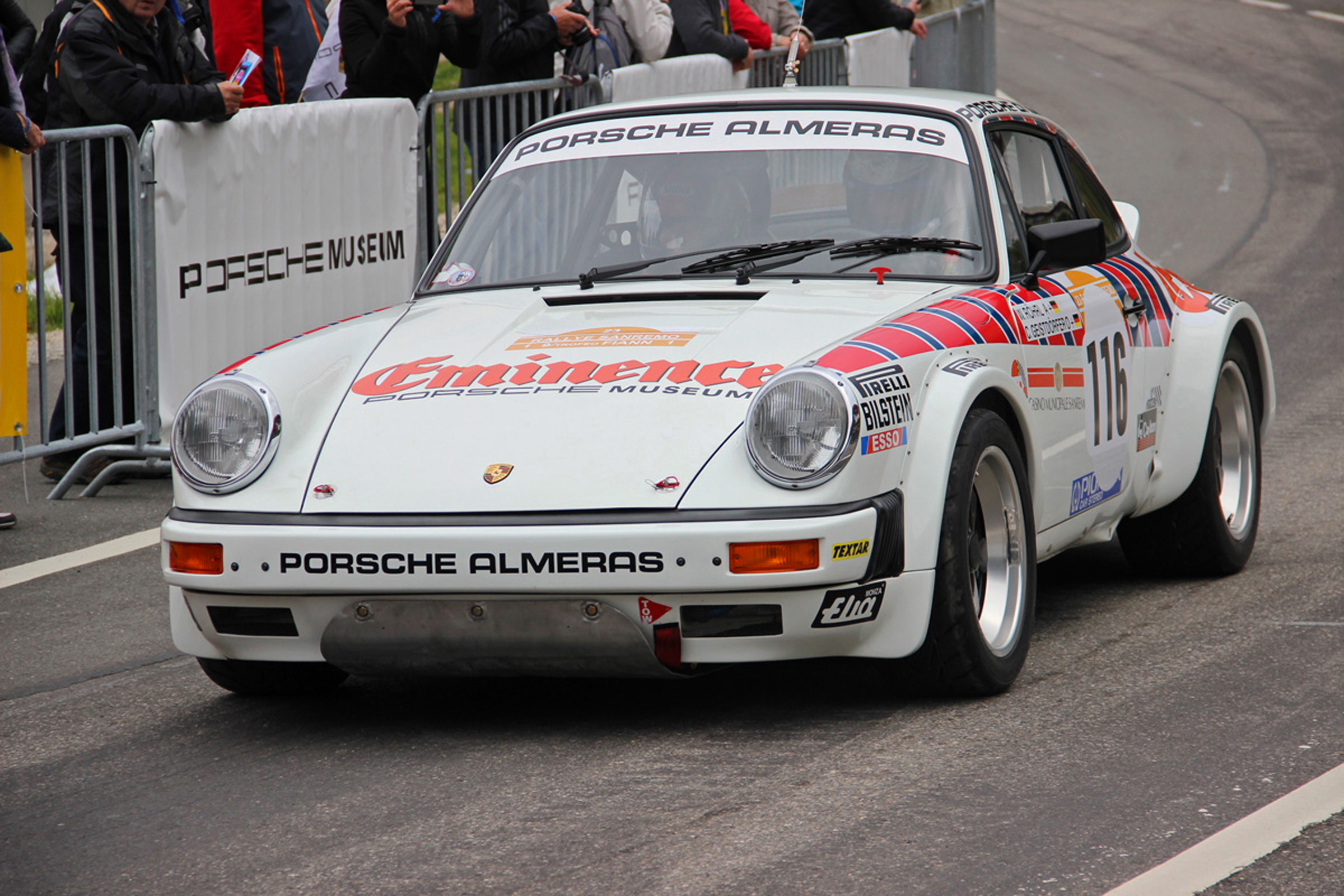 Porsche 911SC - Rallye San Remo 1981